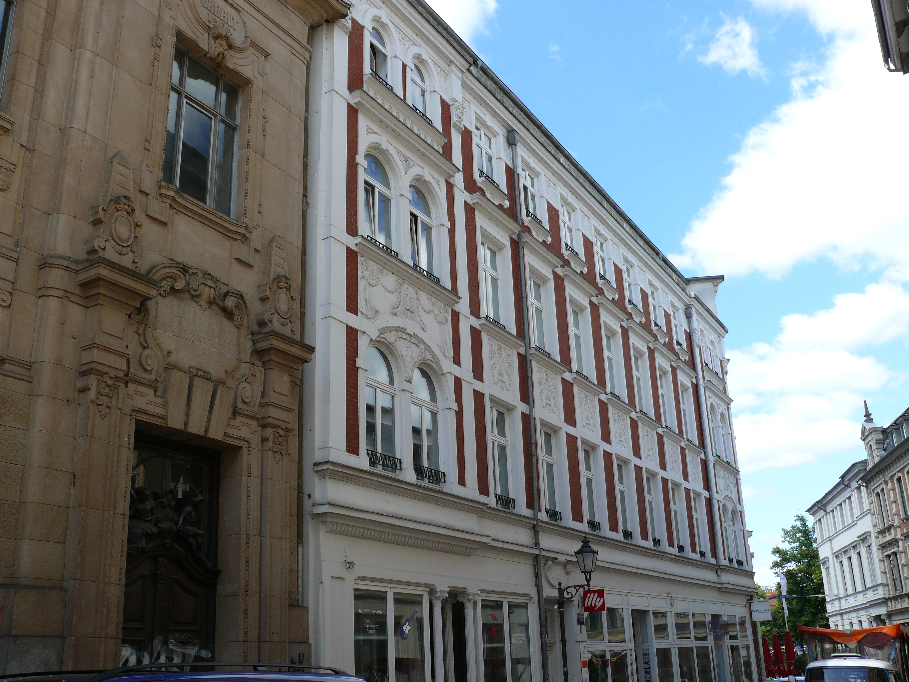 Das Gebäude "Friedrichstraße 3" in Schwerin.